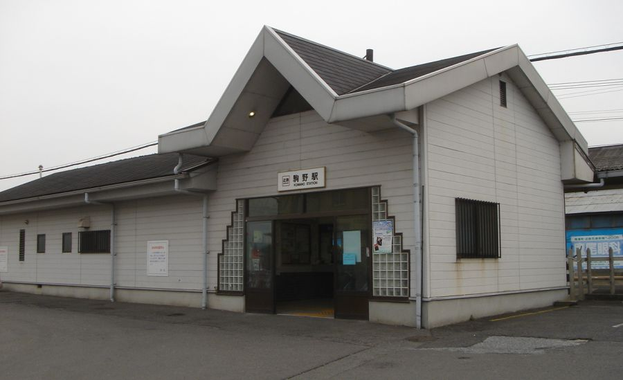 駒野駅（岐阜県海津市・養老鉄道養老線（撮影当時は近鉄）） 撮影者：投稿者(Monami)、撮影日：2005年11月